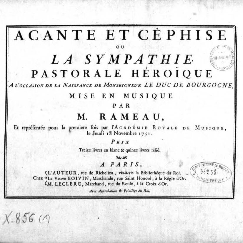 Page de garde de la partition